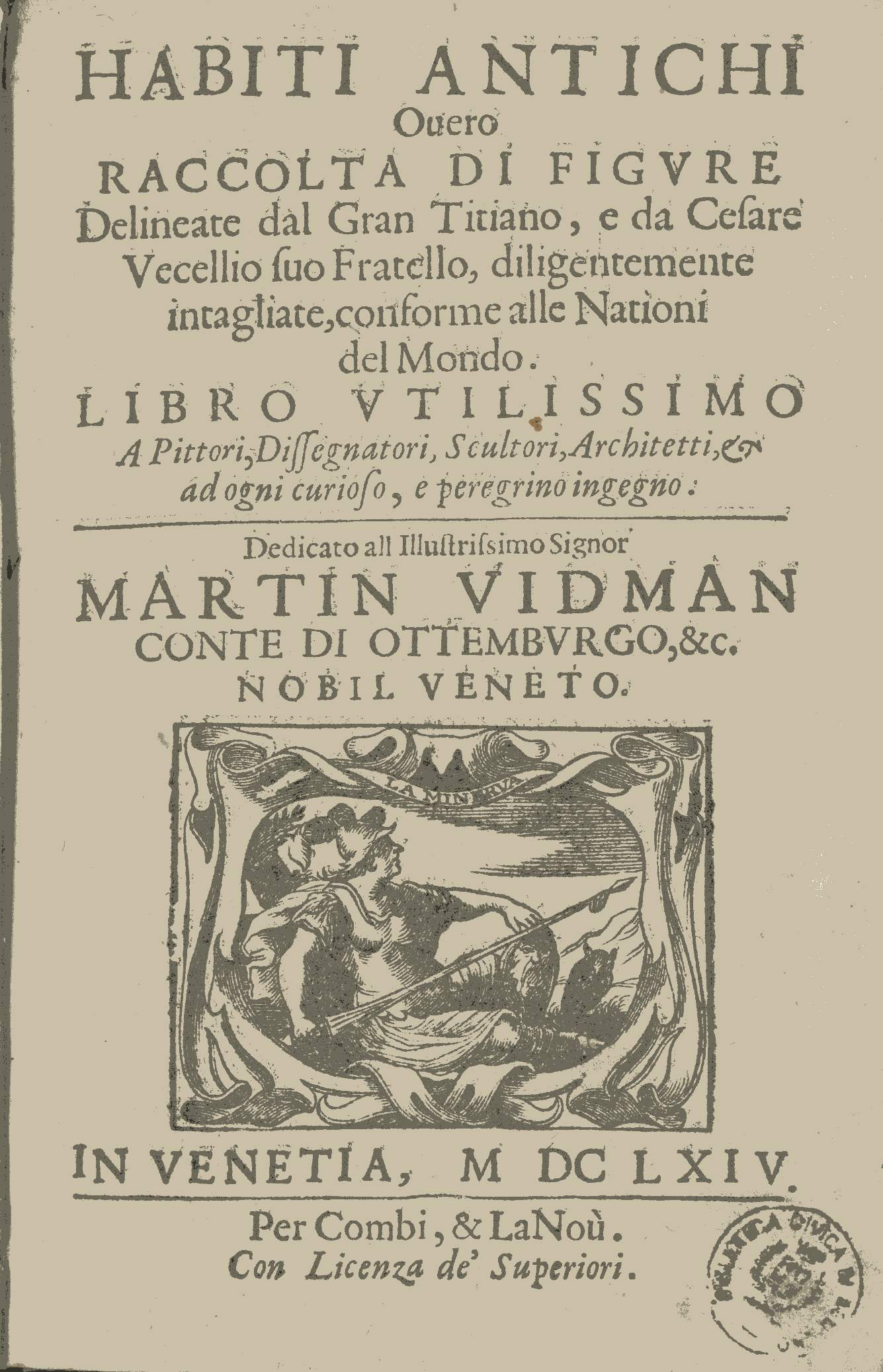 De gli habiti antichi, et moderni di diverse parti del mondo è un’opera di Cesare Vecellio ( 1521 – 1601). frontespizio edizione 1590